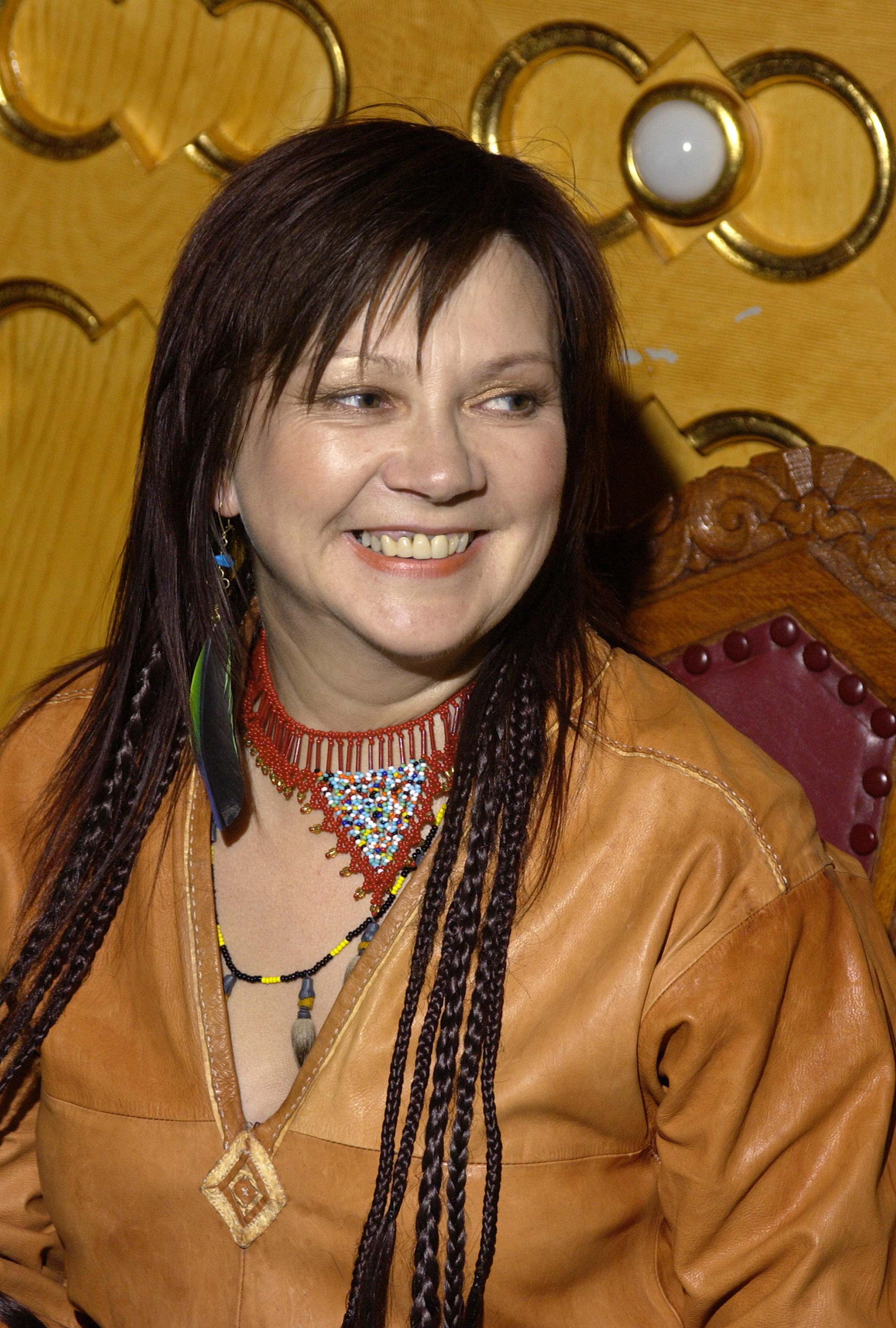 Mari Boine, Nordiska rådets musikpristagare (Bilden är tagen vid Nordiska rådets session i Oslo, 2003)